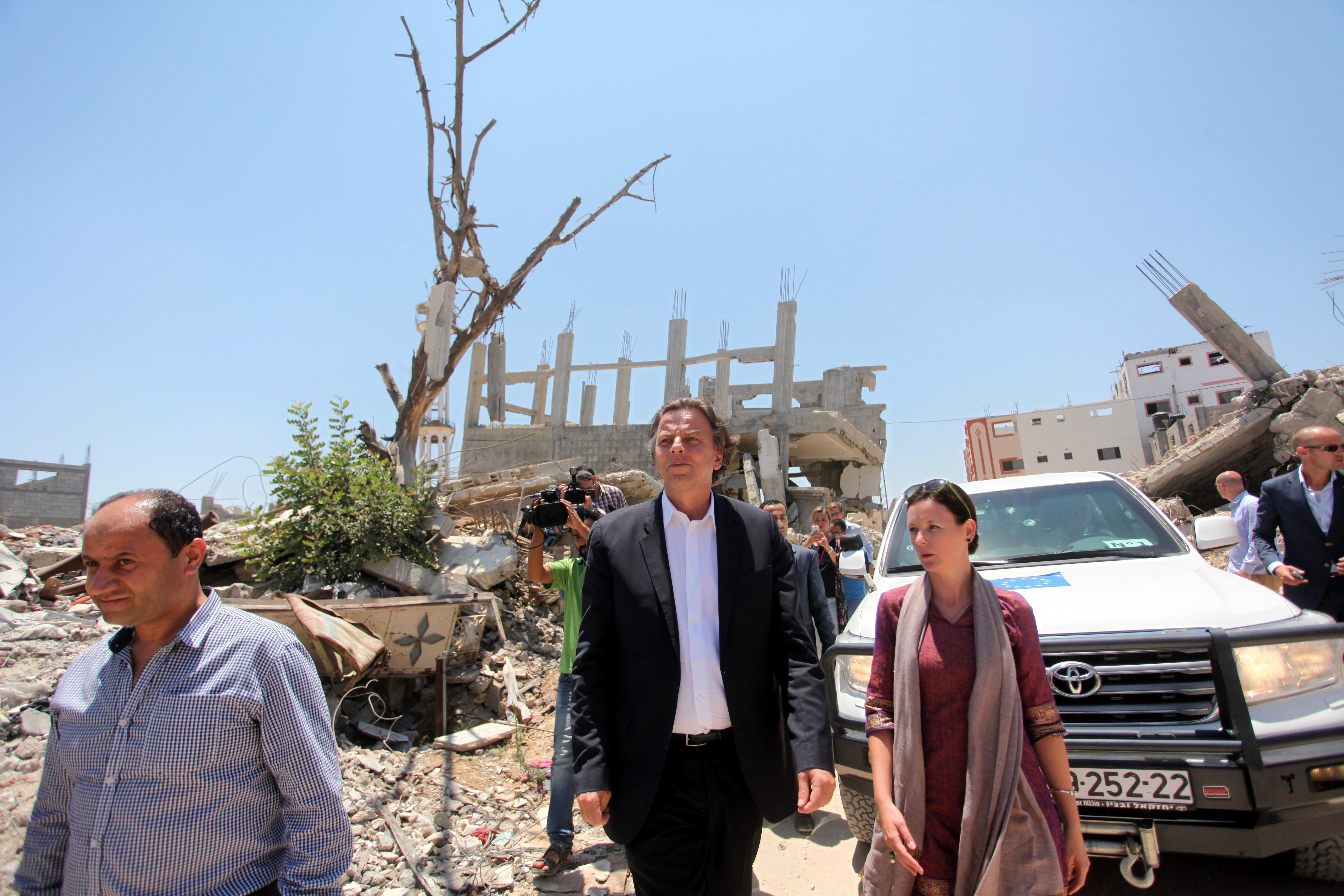 Tijdens zijn bezoek aan Israël en de Palestijnse Gebieden bezocht minister Koenders onder meer Gaza stad. Foto's BZ | Kobi Wolf